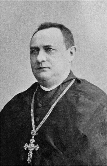 Leander Franz Czerny (1859-1944), rakouský katolický kněz, benediktin, a významný entomolog